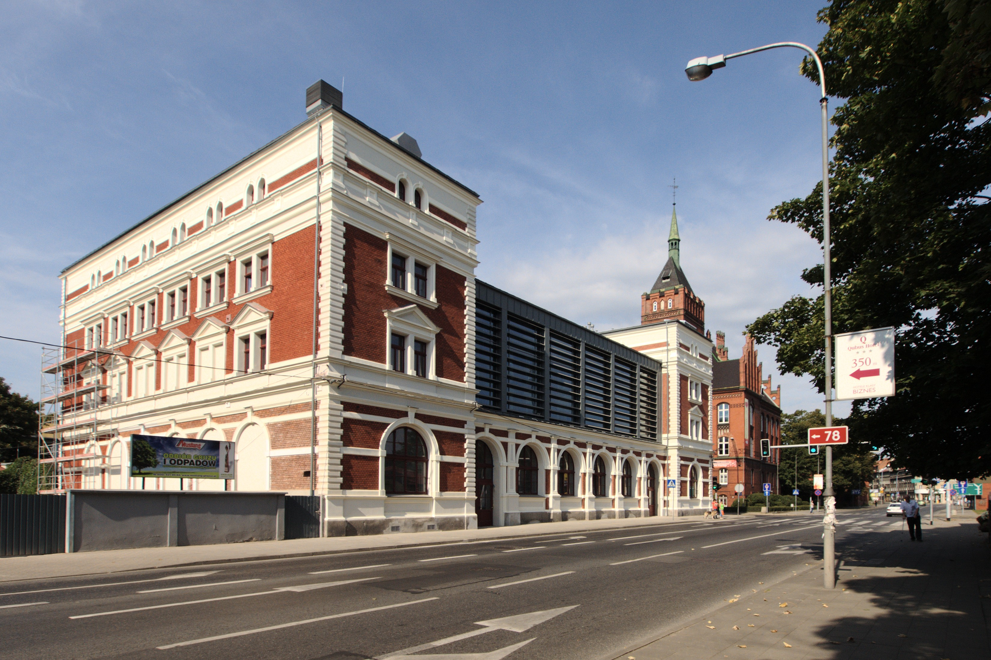 Ulica Wrocławska w Gliwicach. Budynek Wydziału Architektury Politechniki Śląskiej (dawny Kinoteatr "X").